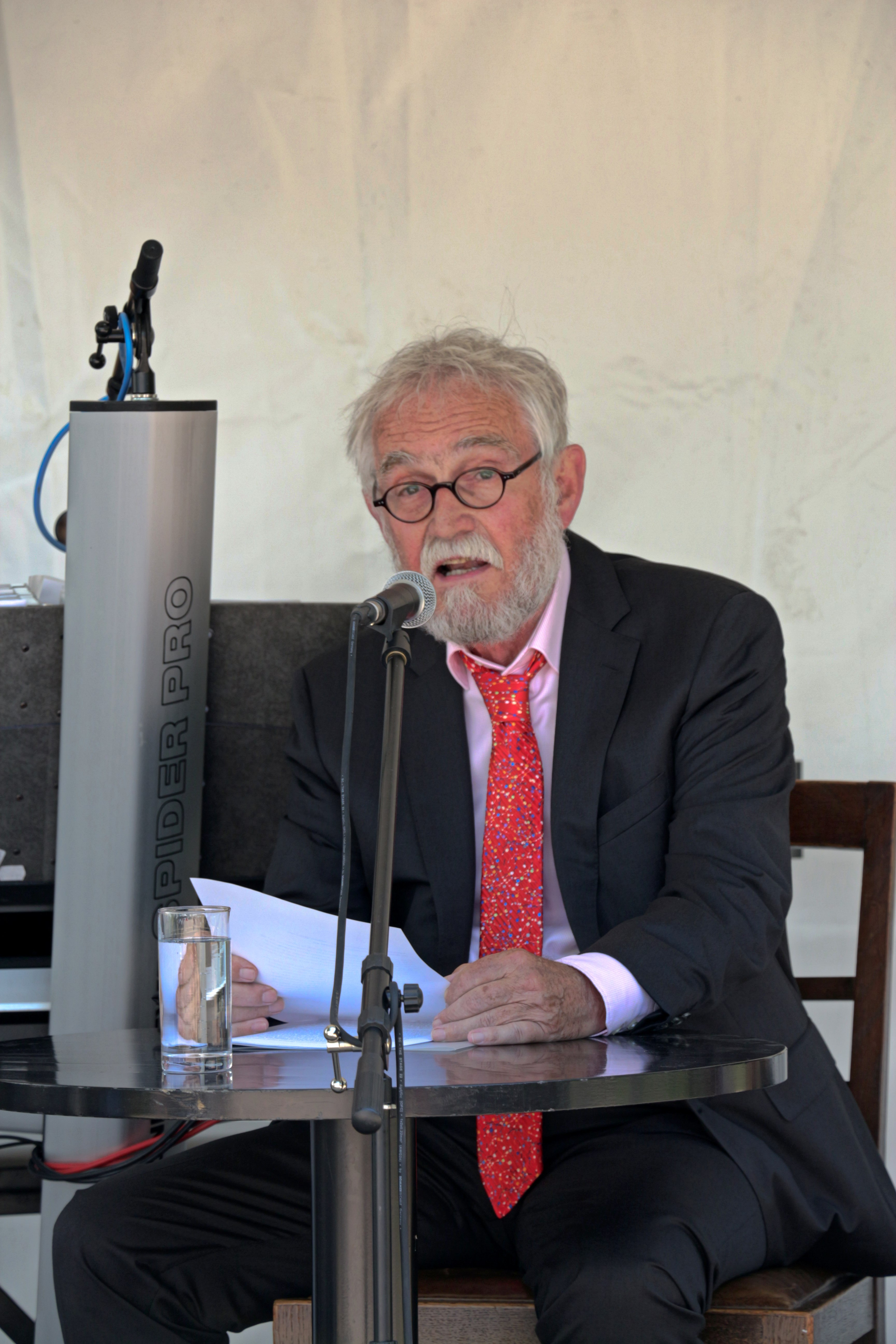 Der Autor und Verleger Jochen Jung in Salzburg, 2015.